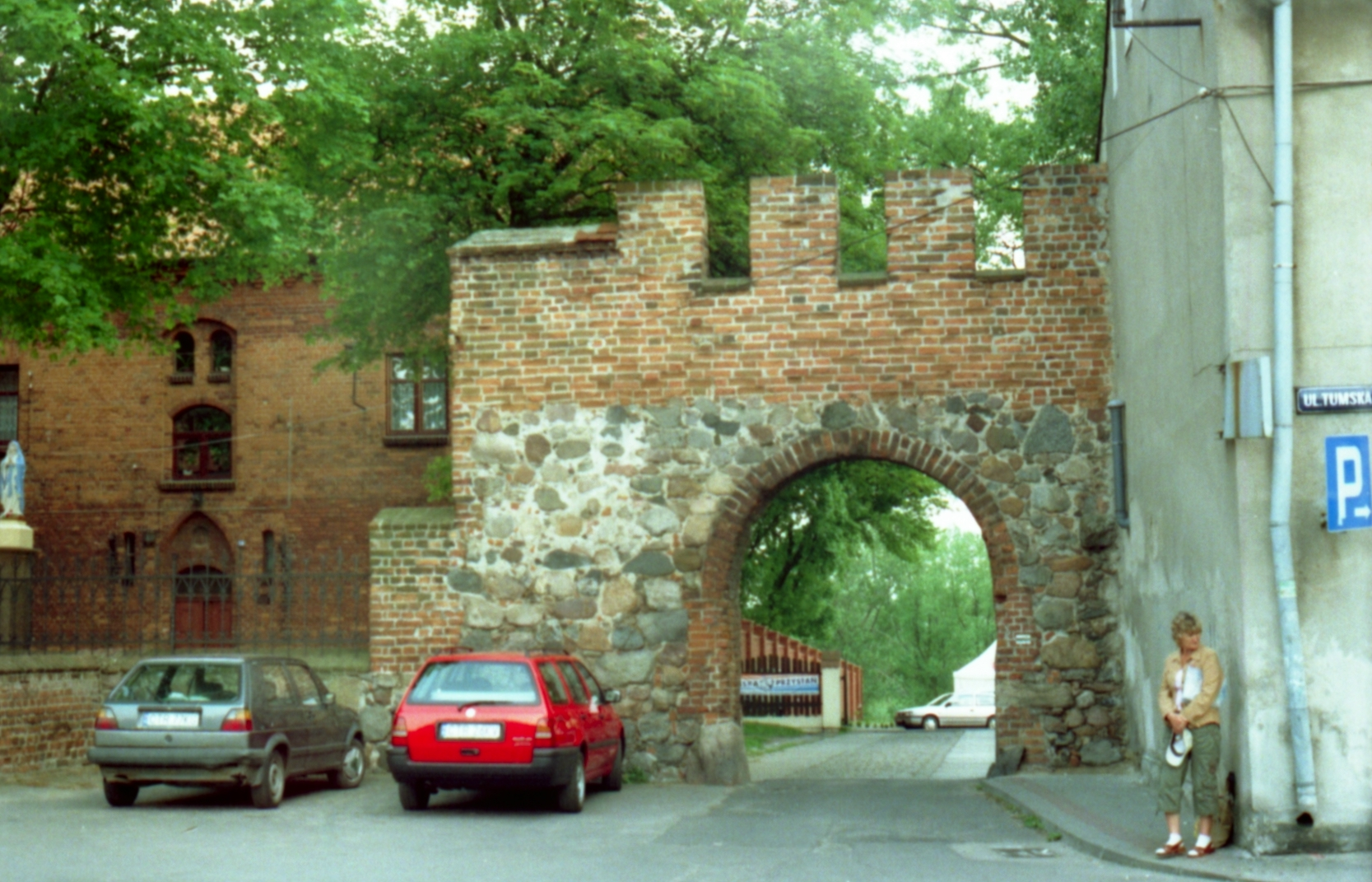 Chełmża, gateway, 2007